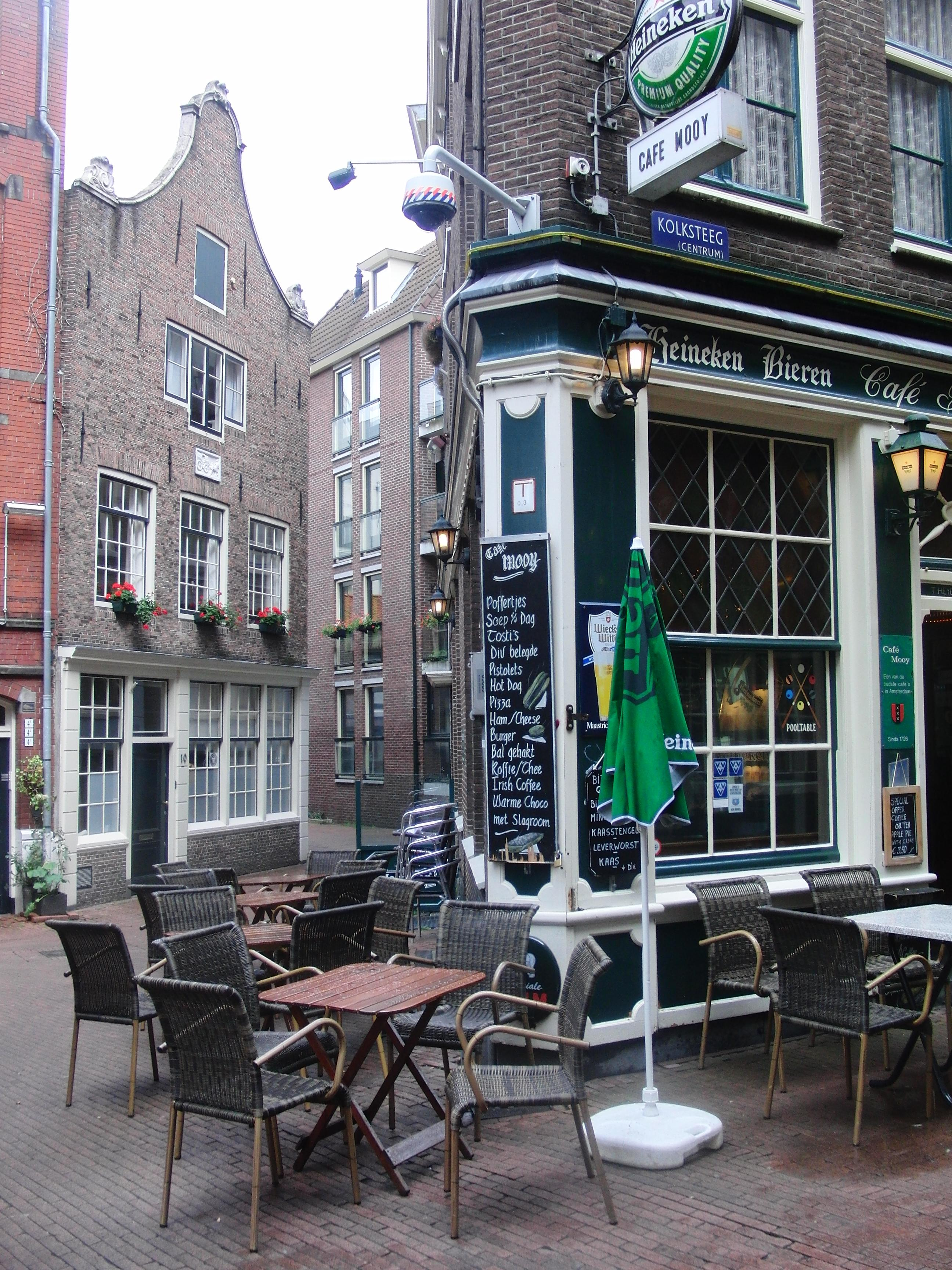 Kolksteeg / Sint Jacobsdwarsstraat, Amsterdam